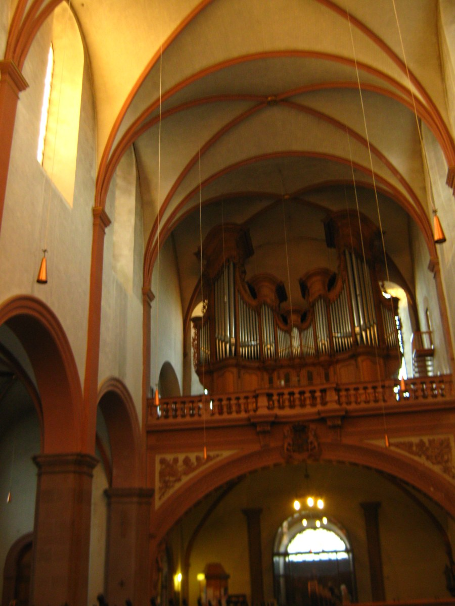 54595 Prüm, Germany